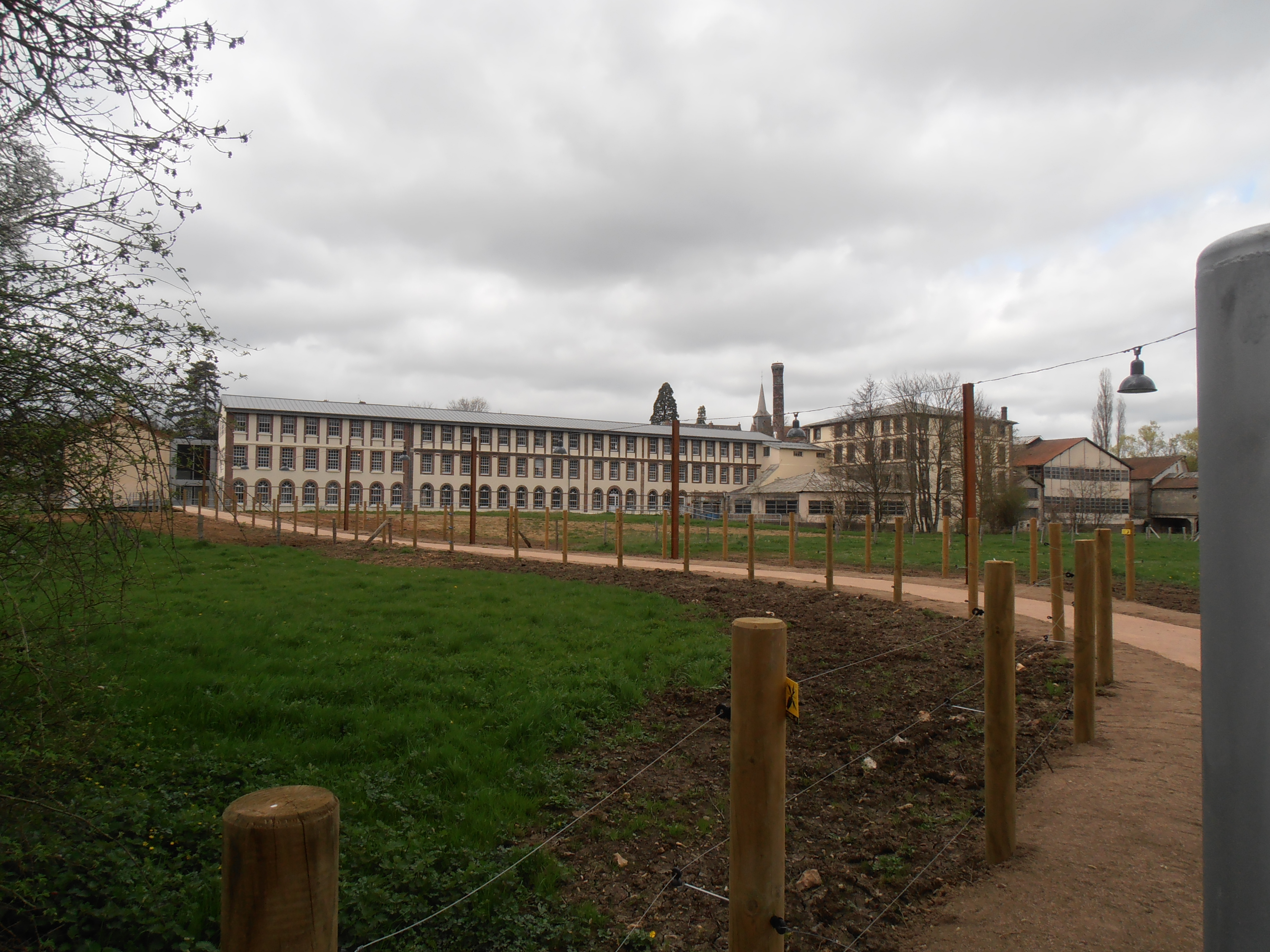 Orne, Saint-Sulpice-sur-Risle, La manufacture Bohin Vue générale permettant de découvrir, grâce à un accès aménagé et éclairé à travers la campagne, la façade historique de l'entreprise : ISMH 1995 Tréfilerie d'aiguilles et d'épingles reconstruite en grande partie vers 1880 par Benjamin Bohin